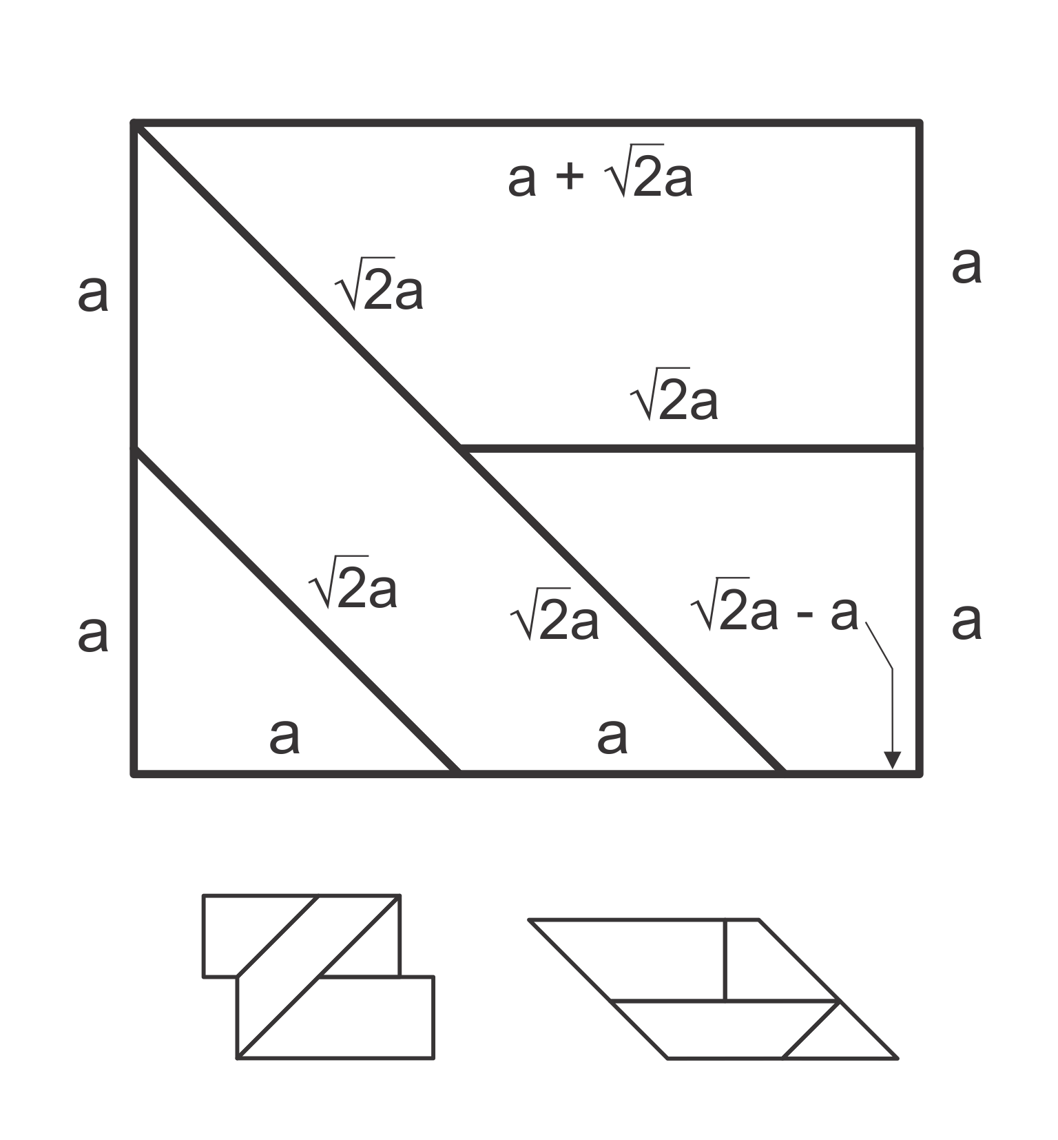 Hình ảnh của small T (T3)